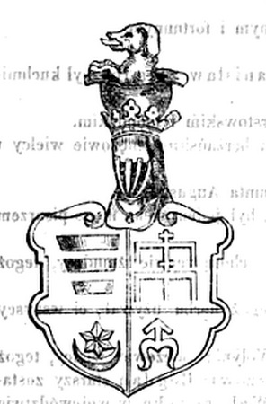 Четырёхчастный герб Корчак Кмитов Чернобыльских от Б. Папроцкого